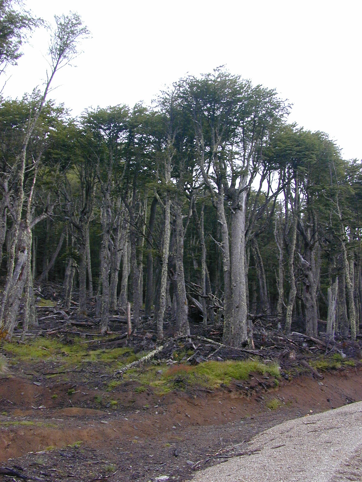 Bosque de lenga (Nothofagus pumilio) de altura. Estancia Chacabuco (Parque Patagonia) Sector El Furioso. XI Región. Chile